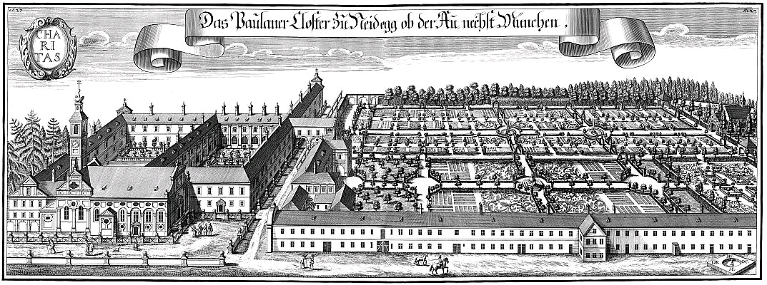 Kupferstich des Paulanerklosters in der Au in München von Michael Wening in der Topographia Bavariae um 1700